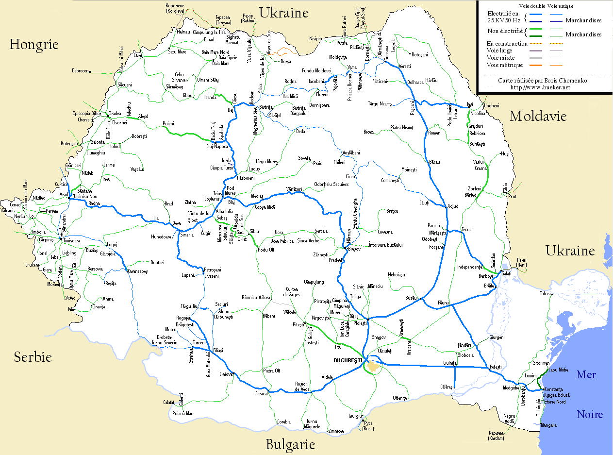 Carte des chemins de fer roumains